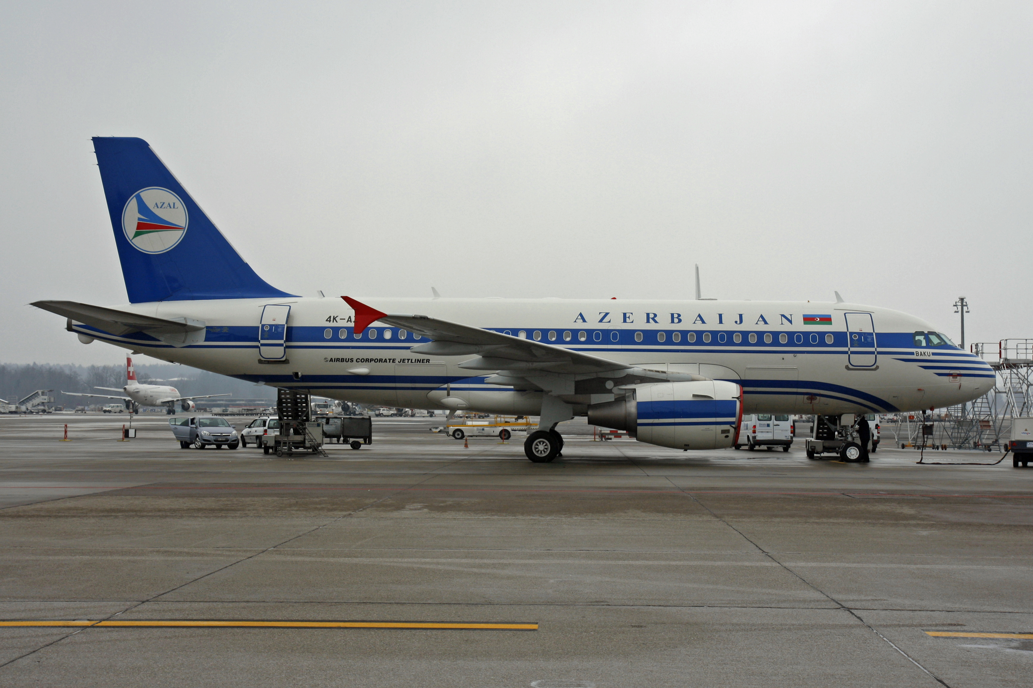 _MG_0088 X